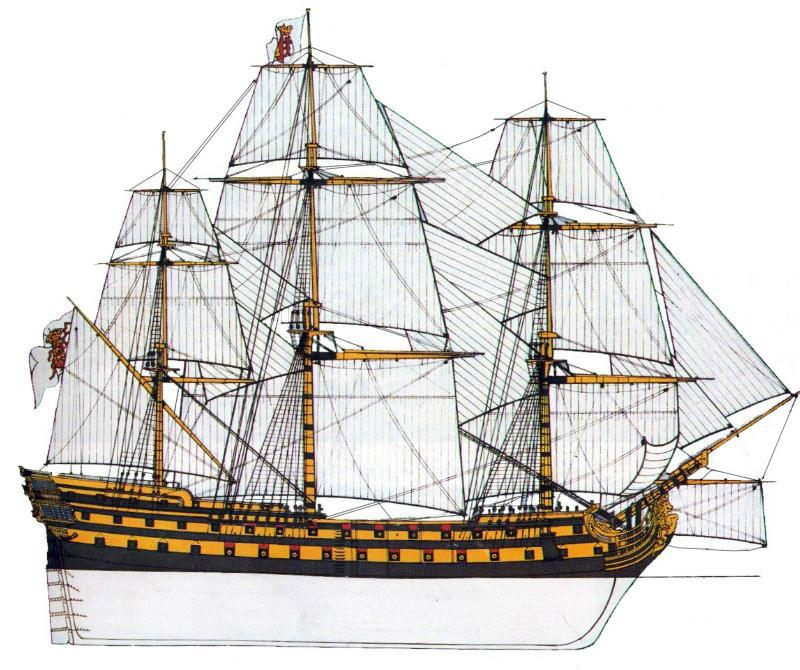 Navío Real Fenix de la Armada Española, realizado por Rafael Berenguer (1822-1890), museo naval de Madrid